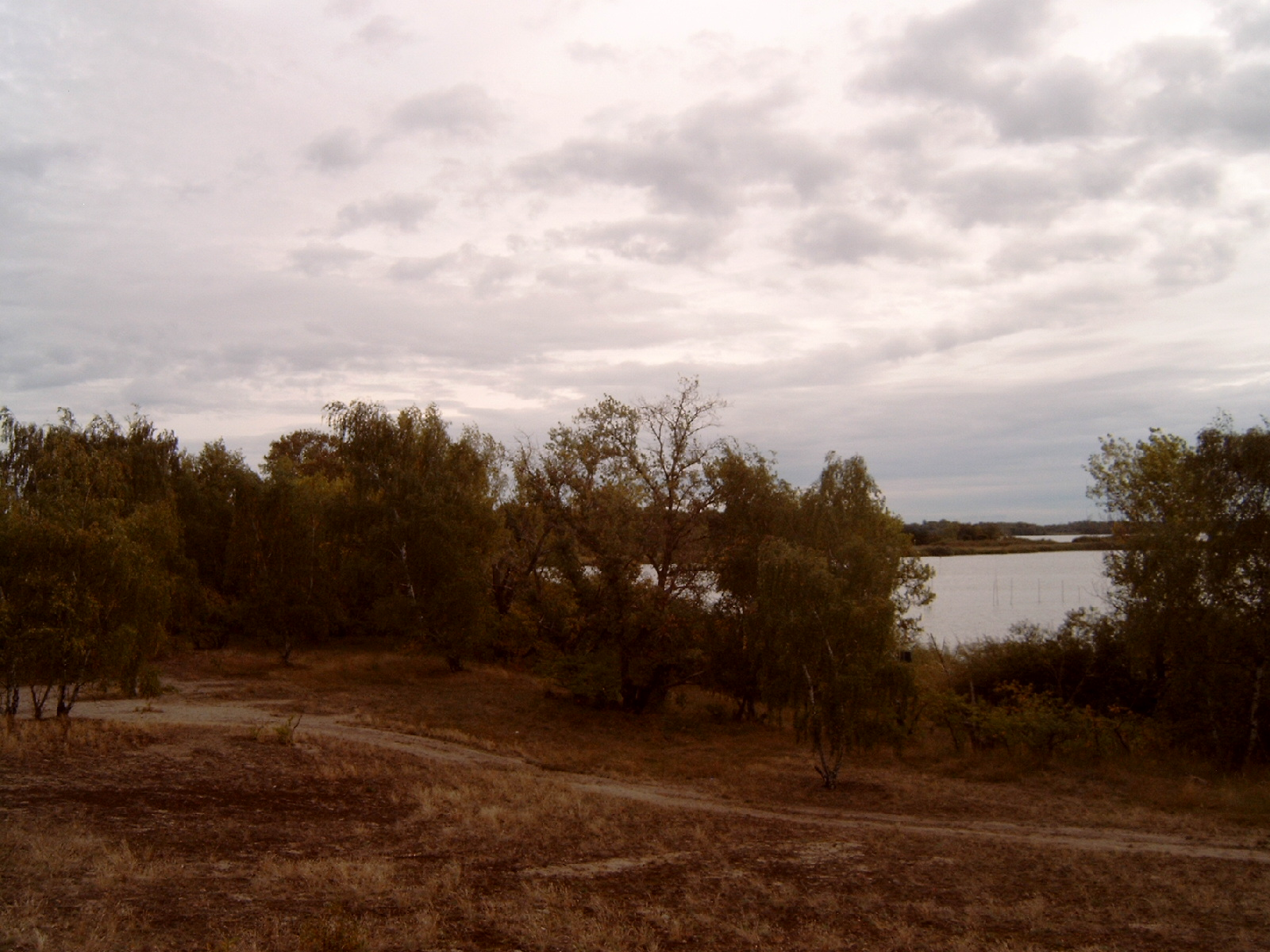 Halbinsel Wusterau Nordhälfte, Blick nach Nordosten zur Insel Buhnenwerder.